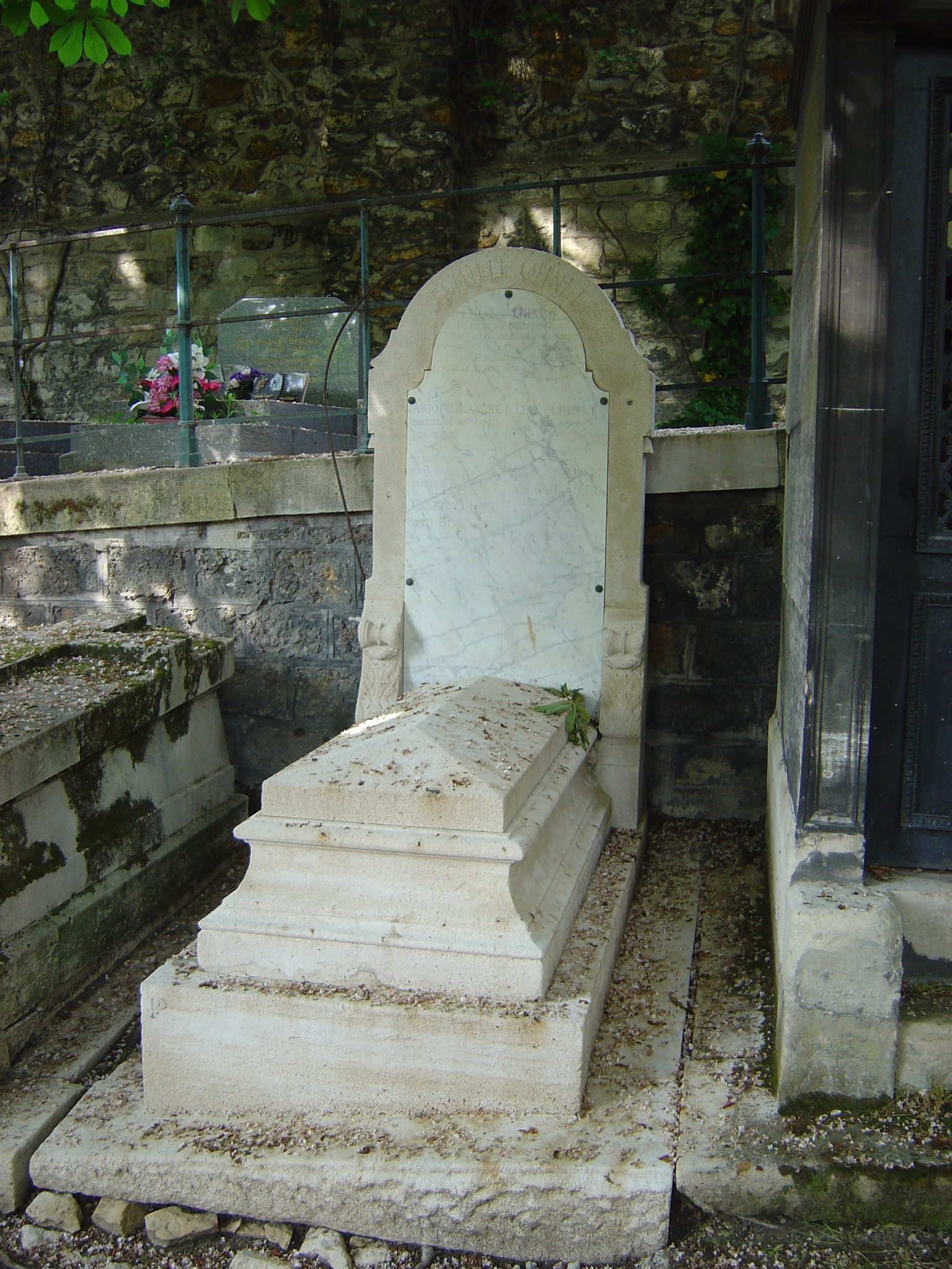 Tombe de la famille Ohnet au cimetière de Montmartre. Inscriptions : "Famille Ohnet" "Léon Ohnet, architecte du gouvernement, membre du conseil municipal de Paris, chevalier de la Légion d'honneur, officier de l'Instruction publique, décédé le 30 juin 1874 à l'âge de 61 ans" Antoine Blanche, premier avocat général à la Cour de cassation, commandeur de la Légion d'honneur, né le 29 septembre 1808, décédé le 13 avril 1875" "Claire Ohnet née Blanche, 10 mai 1829 - 28 mars 1904" "Léon Ohnet, 5 avril 1878 - 7 février 1903, 24 ans" "Marguerite Ohnet née Schaeffer, 28 avril 1859 - 14 janvier 1916" "Georges Ohnet, homme de lettres, né à Paris le 5 avril 1848, décédé le 5 mai 1918".